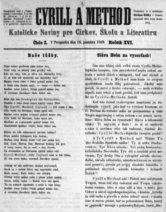 Titulný list novín Cyrill a Method.